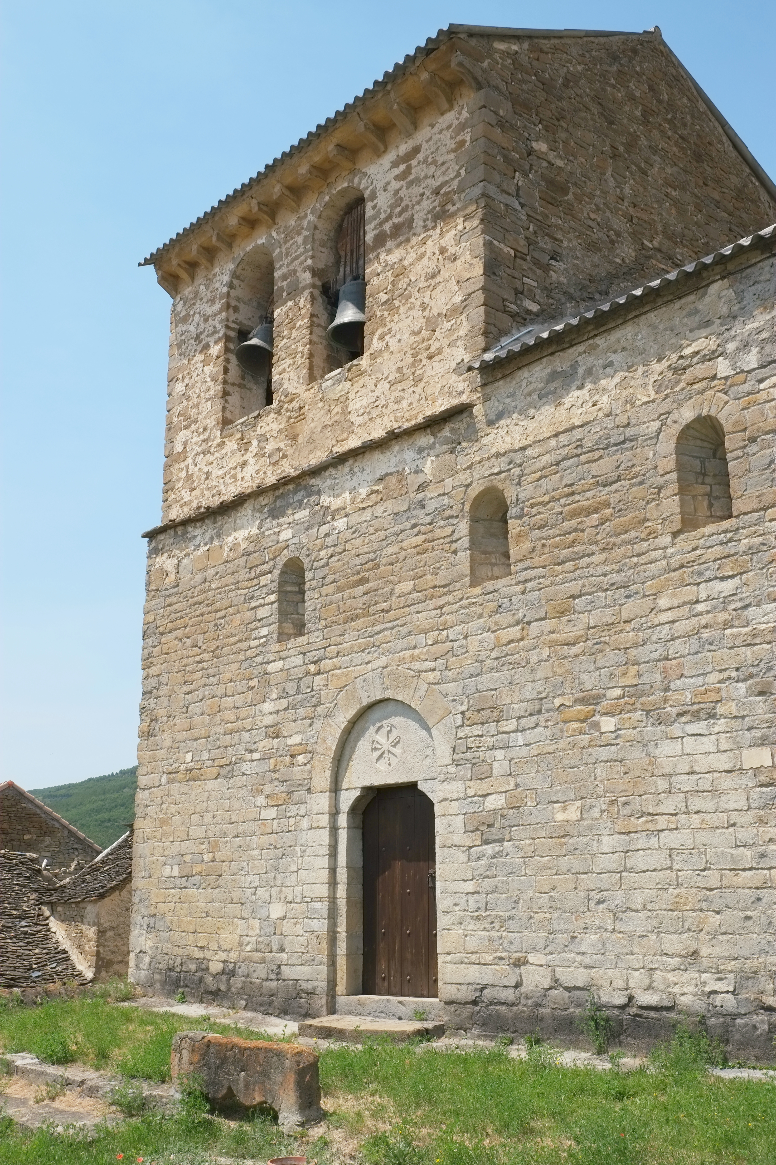 Kirche San Pedro Apóstol in Caniás in der Provinz Huesca in Aragonien (Spanien)